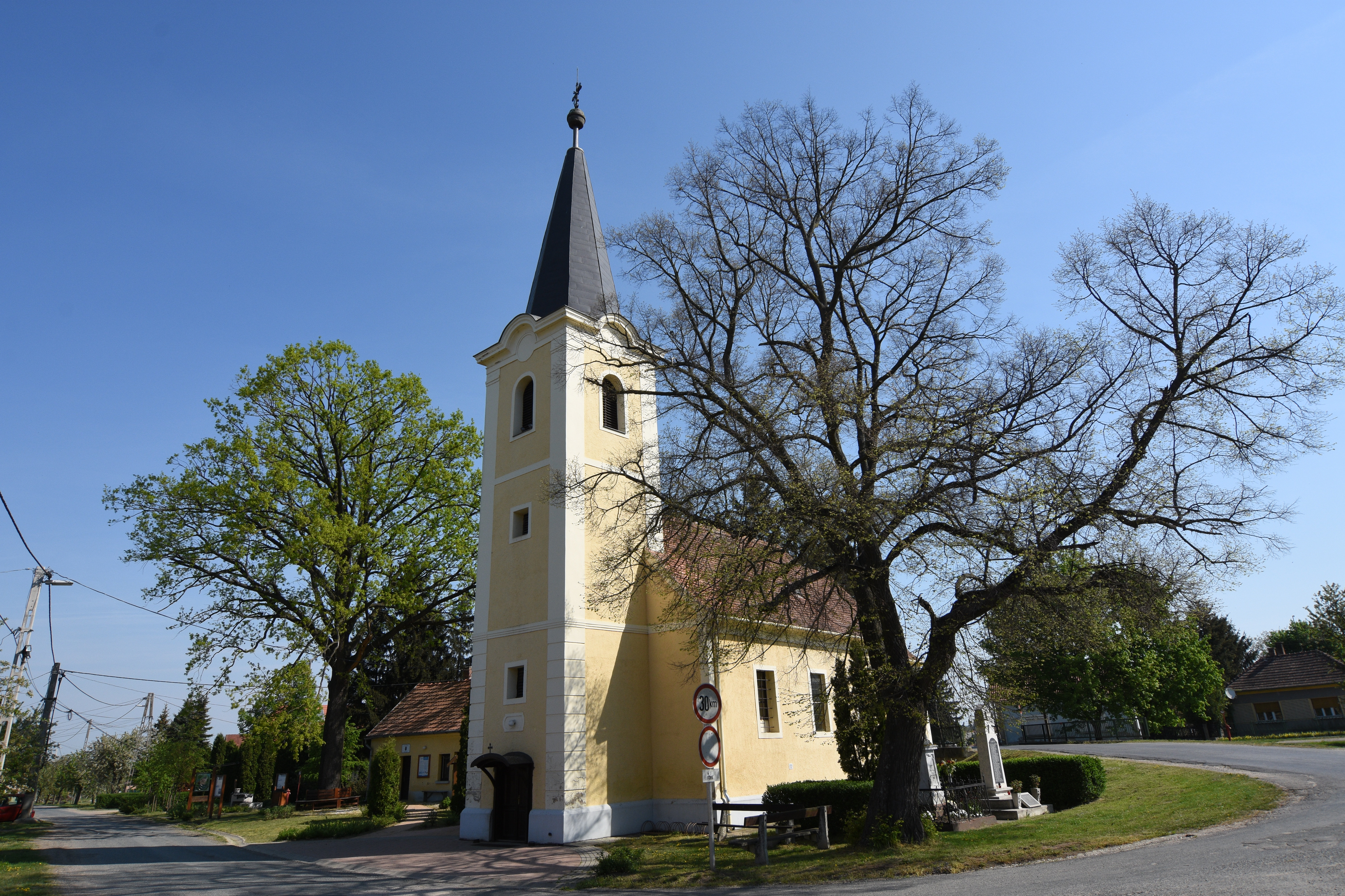 Kirche Alsóújlak, templom